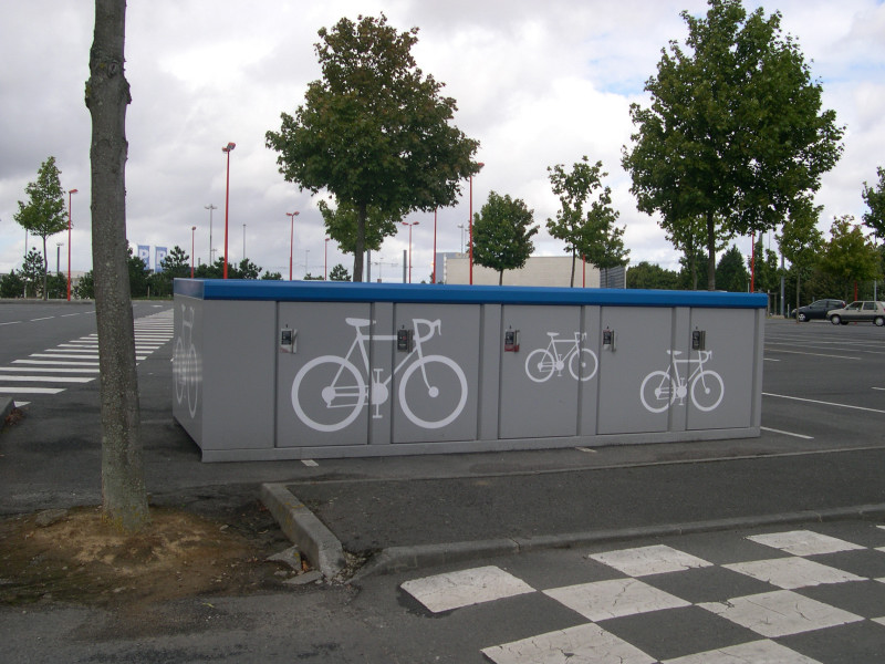 Parking-relais de la Côte-de-Nacre, à Caen